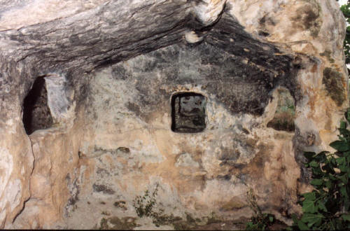 Domus neolitica di cultura San Michele di Ozieri